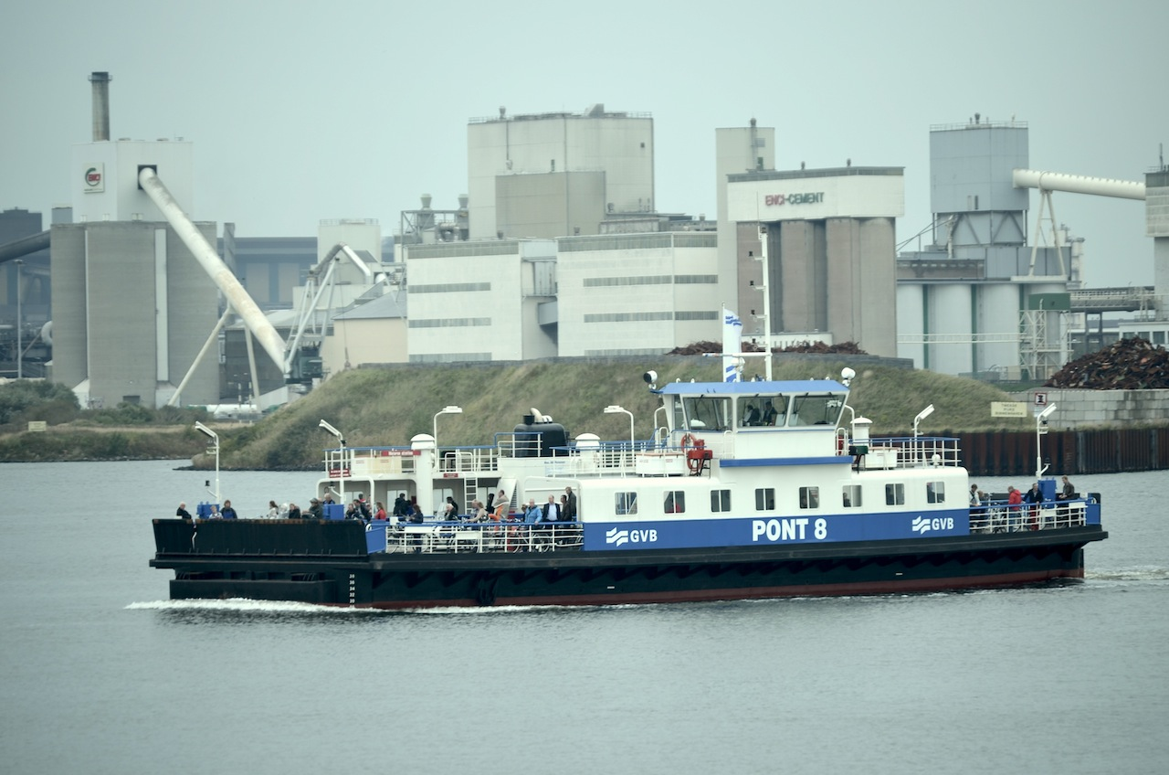 GVB Pont 8 op het Noordzeekanaal bij Velsen. Foto: Erik Swierstra.